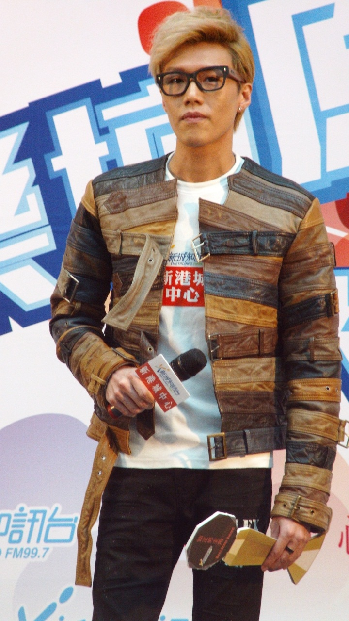 中文（香港）: 歌手洪-{杰}-的樣子